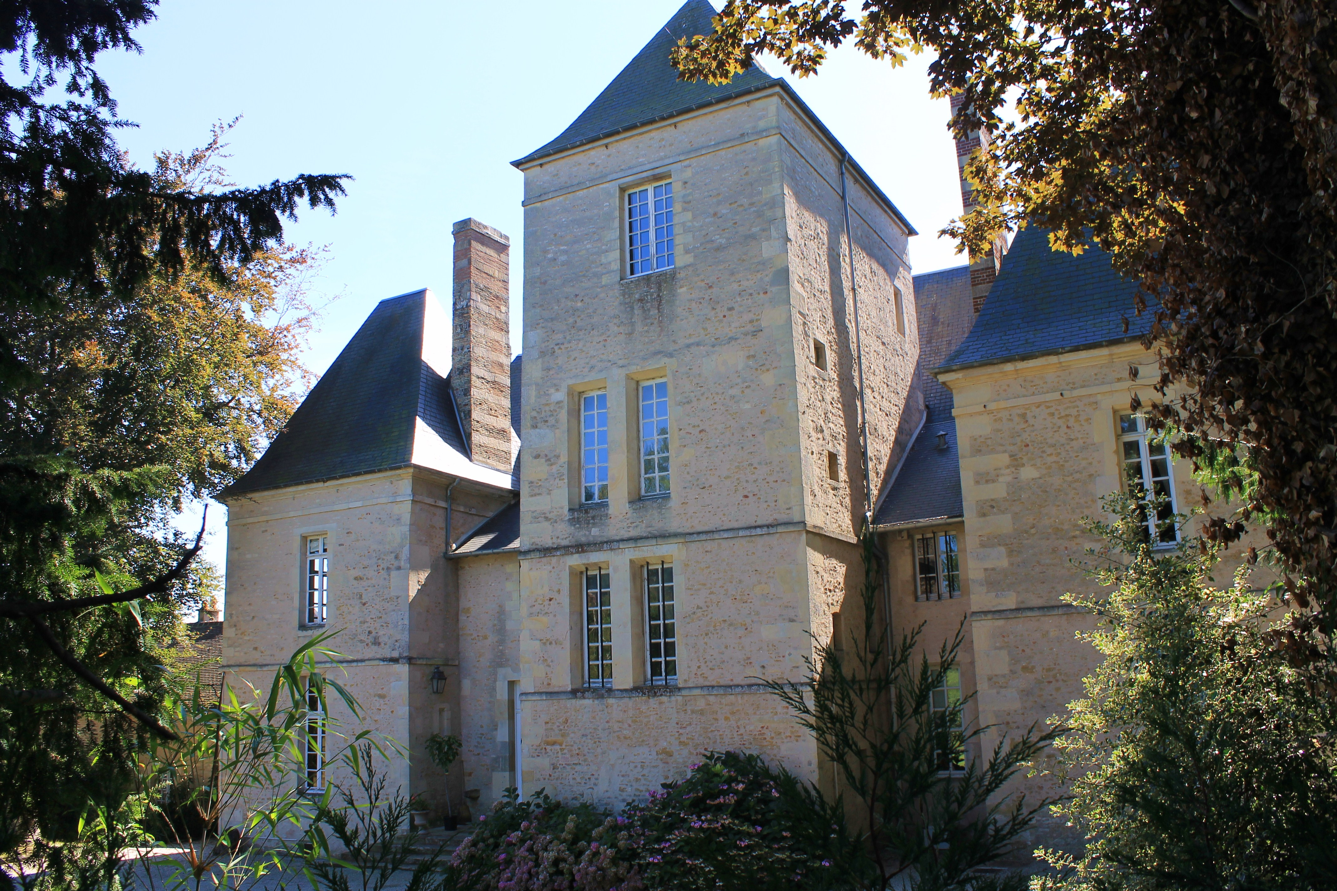 Château de Bavent (Calvados)